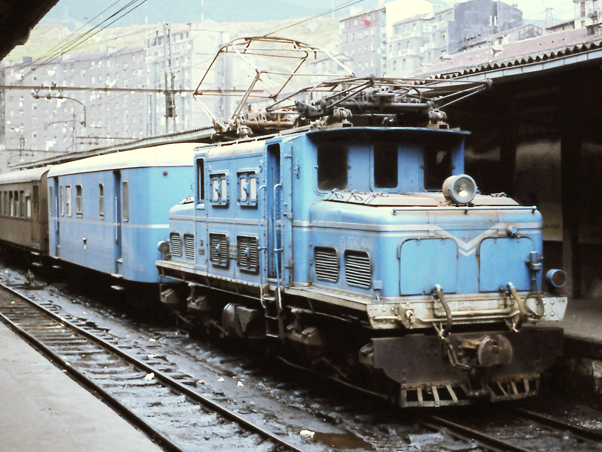 Ferrocarriles de Vía Estrecha locomotief 4001 op 24 september 1977 te Bilbao Achuri.